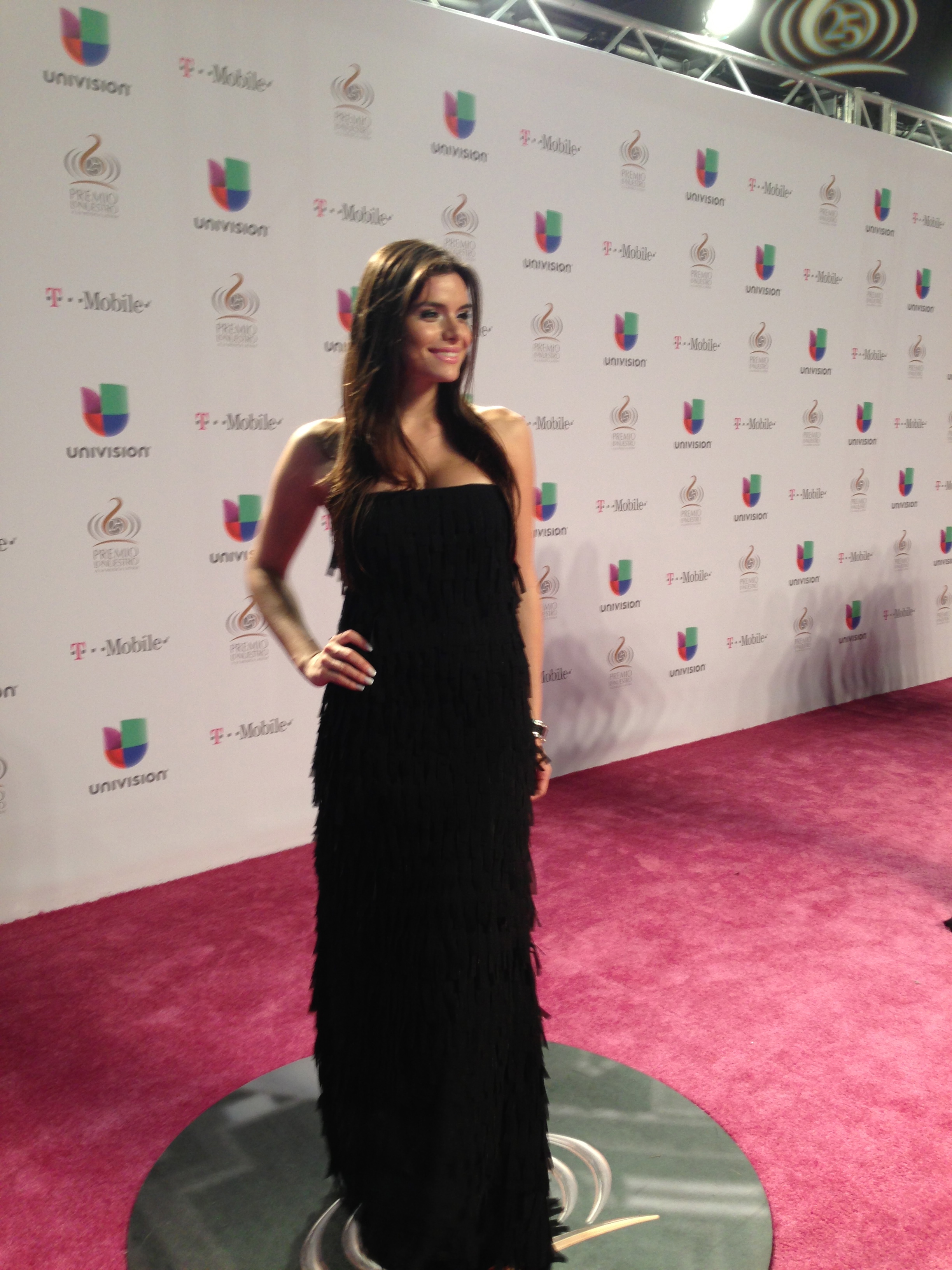 Gretchen en Premio Lo Nuestro 2012